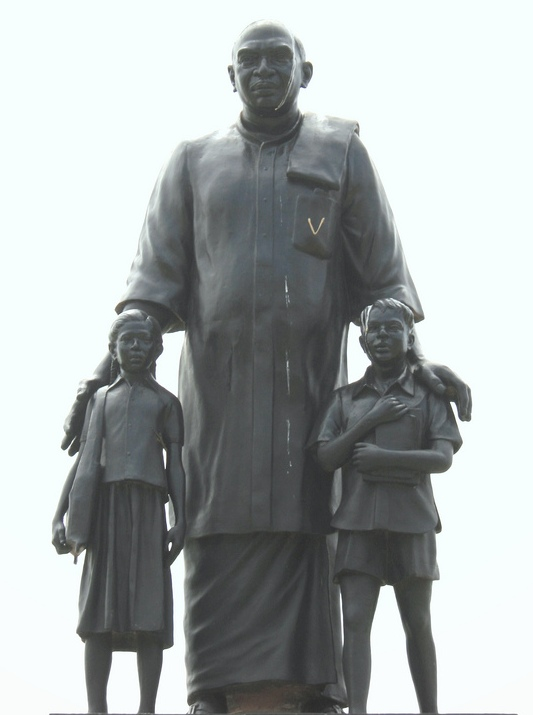 मरीना बीच में खामराज साहब की प्रतिमा